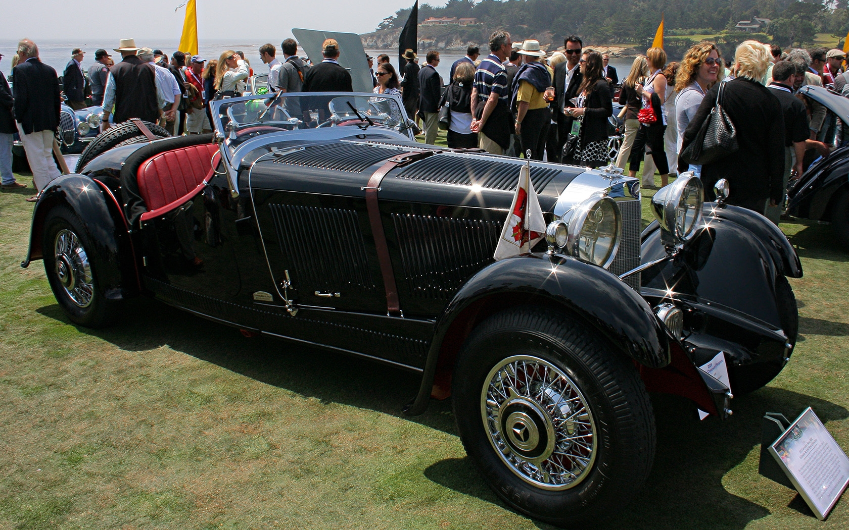 Mercedes-Benz 380K Sport-Roadster